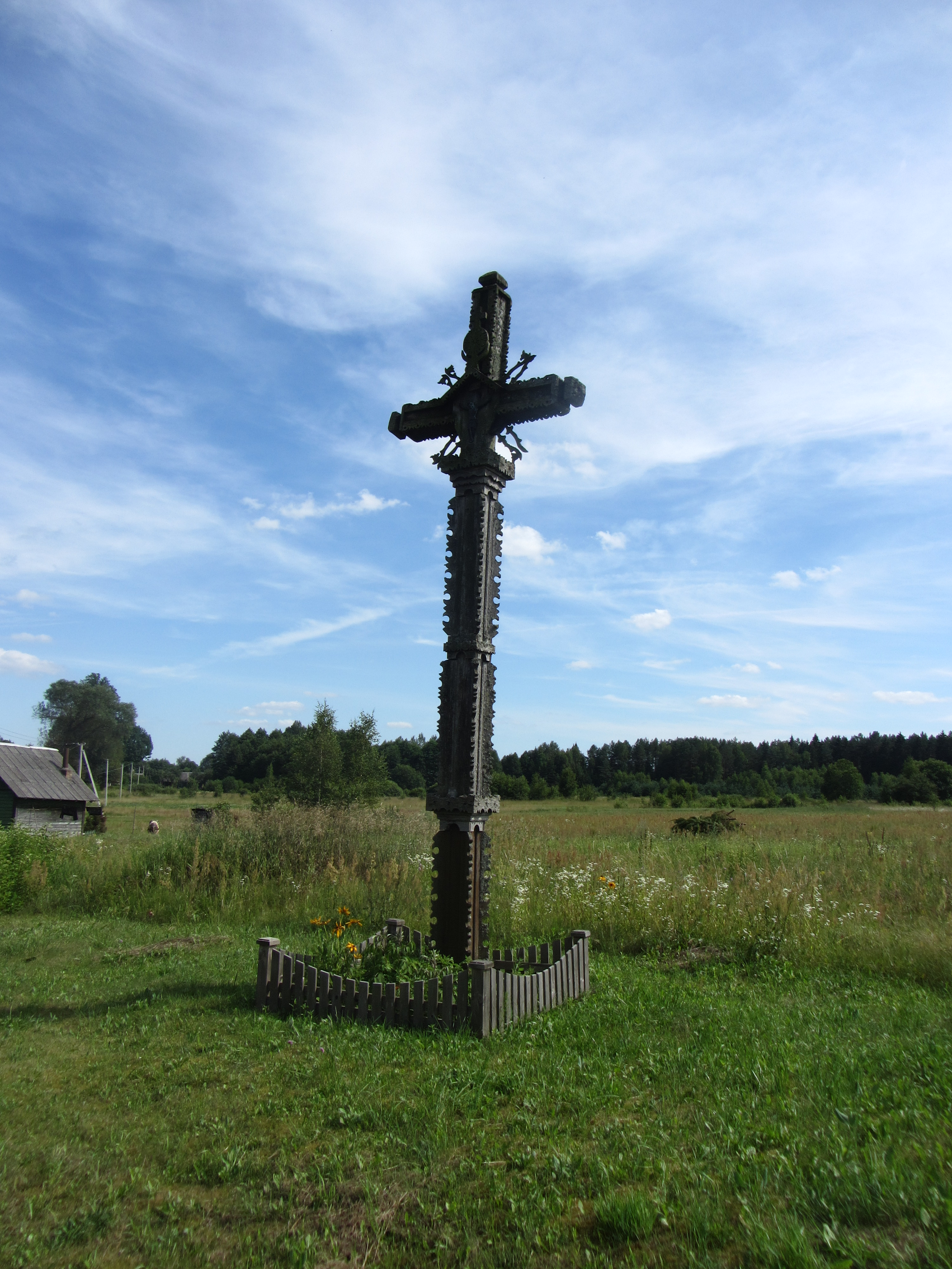 Kūriniai 18238, Lithuania